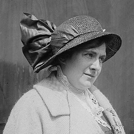 German mezzo-soprano singer Elena Gerhardt (1883-1961)